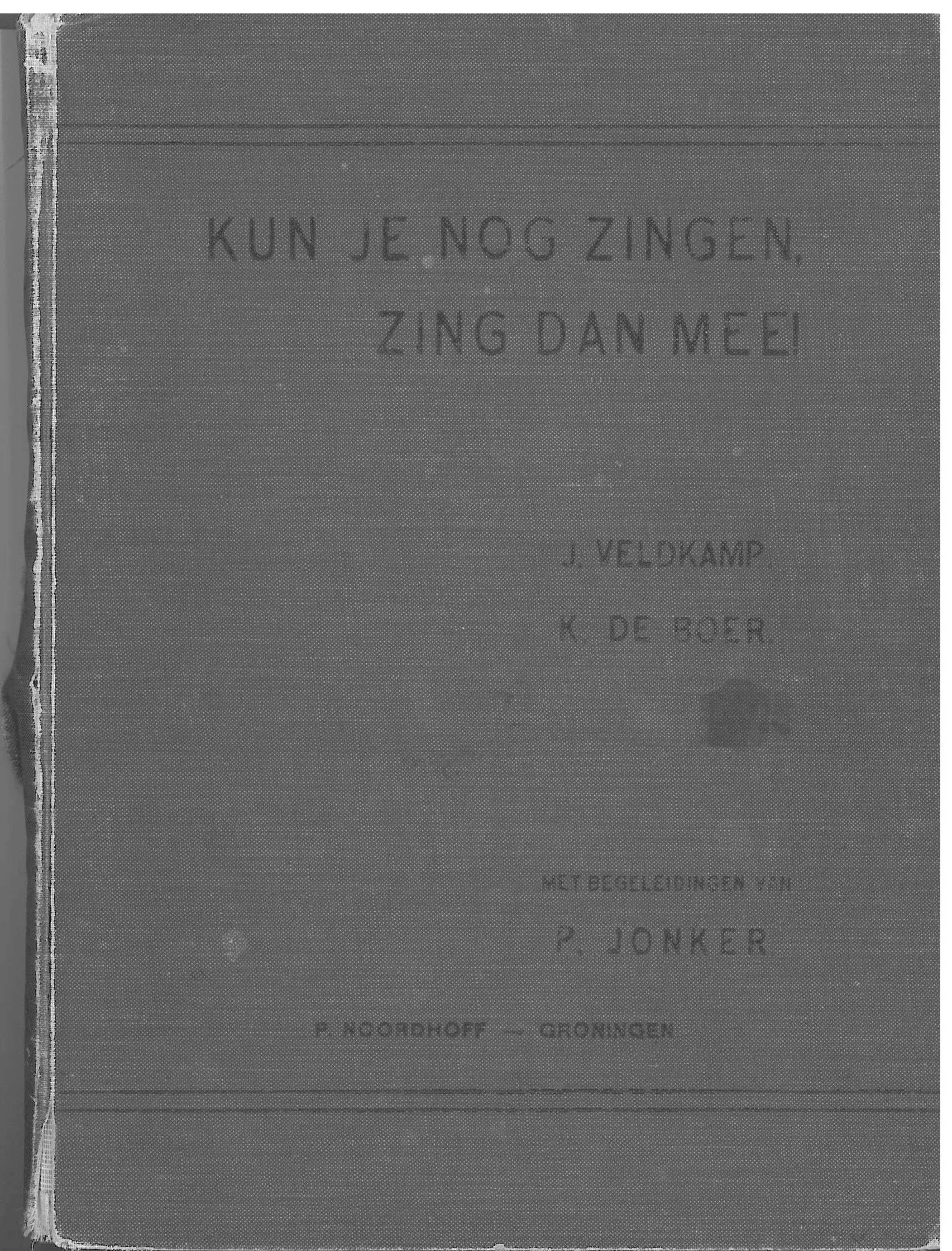 Kun je nog zingen, zing dan mee. Muziek en teksten origineel gepubliceerd voor 1900.